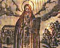 Святи́тель Іларіо́н († 1055) - Митрополит Київський та всієї Руси, перший митрополит русин, оратор і письменник, церковно-політичний діяч давньої України.